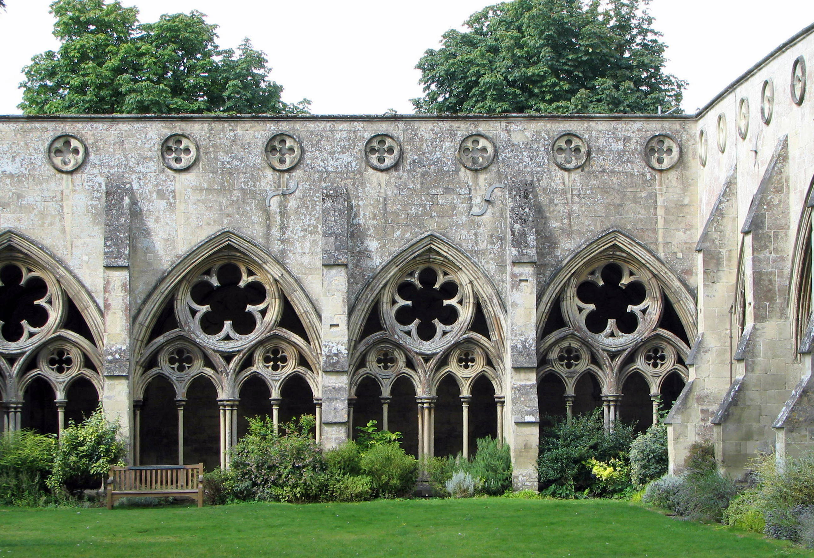 Cloître de la Cathédrale de Salisbury, Angleterre